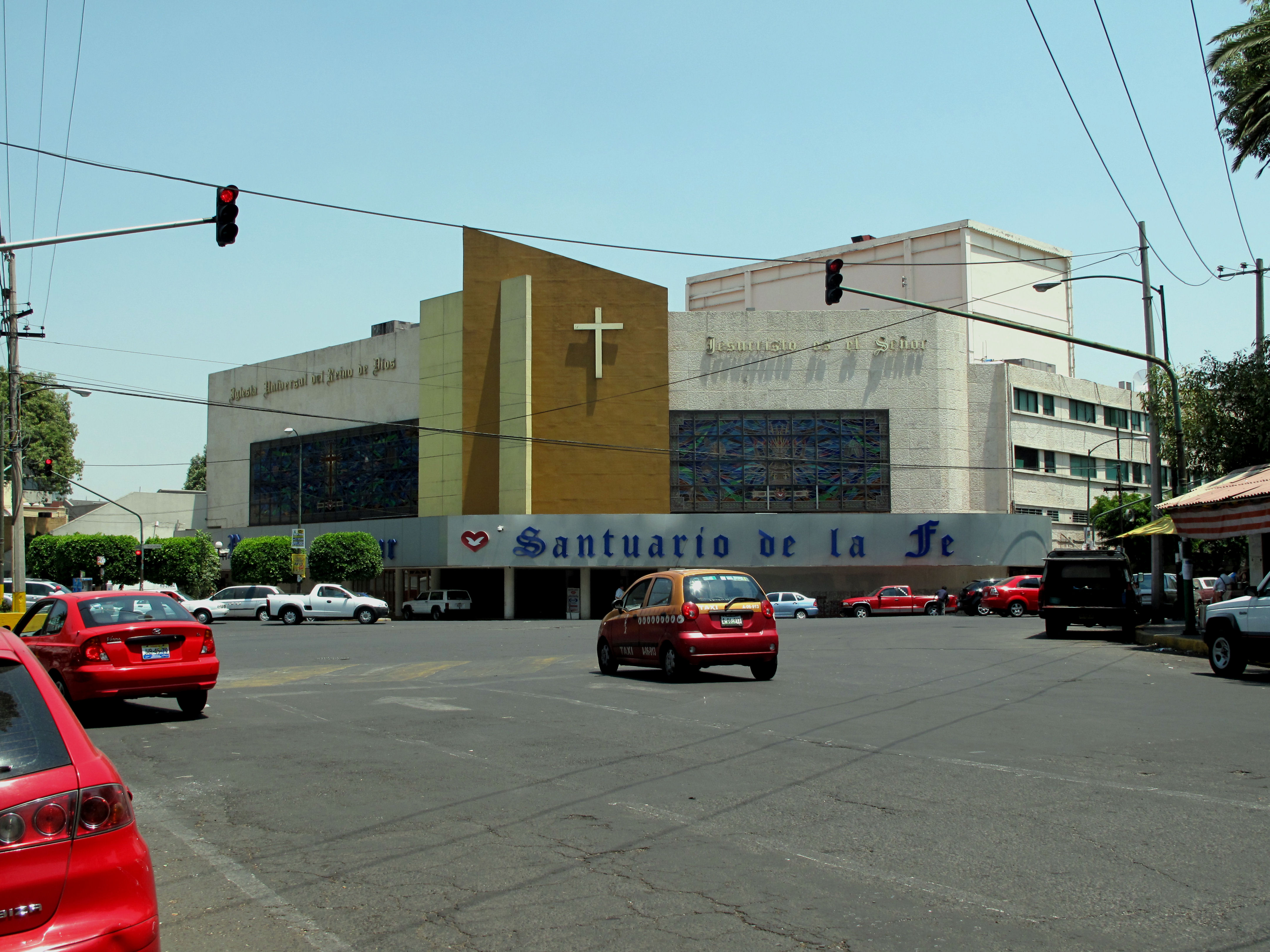 Iglesia universal del Reino de Dios Ciudad de México